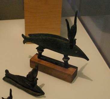 Deux poissons oxyrhynques en bronze exposés dans une vitrine (Barcelone).